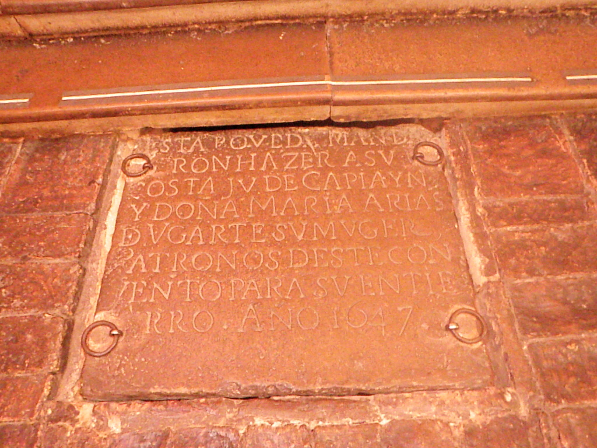 Museo de Santa Clara. Antiguo Claustro de Santa Clara